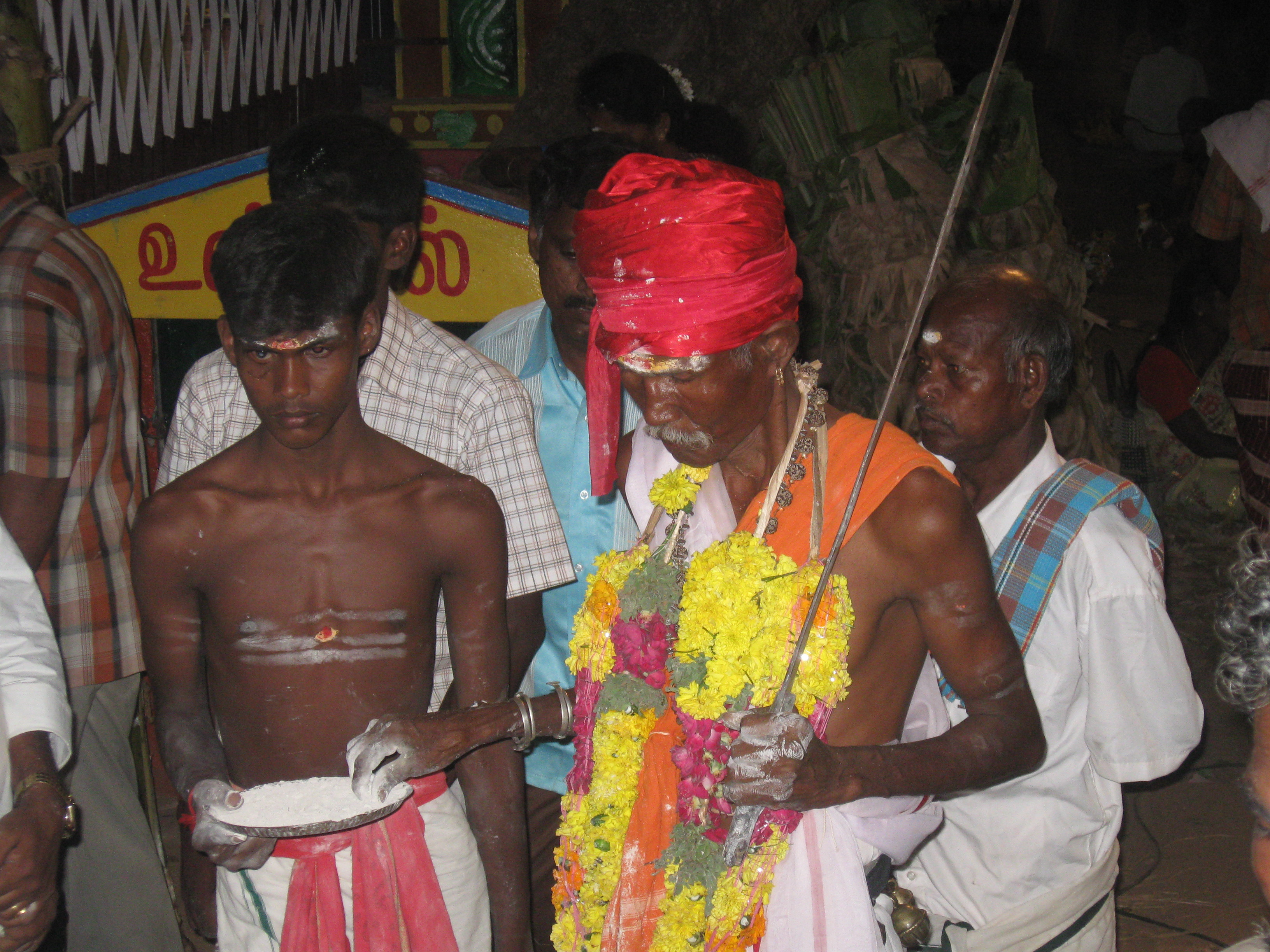 திருவிழாக்களில் தெய்வங்களின் உருஏறப் பெற்ற சாமியாடி என்று வழங்கப் பெறும் அருளாடியின் பங்கு அதிகம். அவர்தம் விளக்கத்திற்கேற்பவே திருவிழாவின் நிகழ்ச்சிகளும் வரைமுறையும் விளங்கும். அருளாடி கையில் வாளொடு திருநீற்றை வழங்கும் காட்சி.